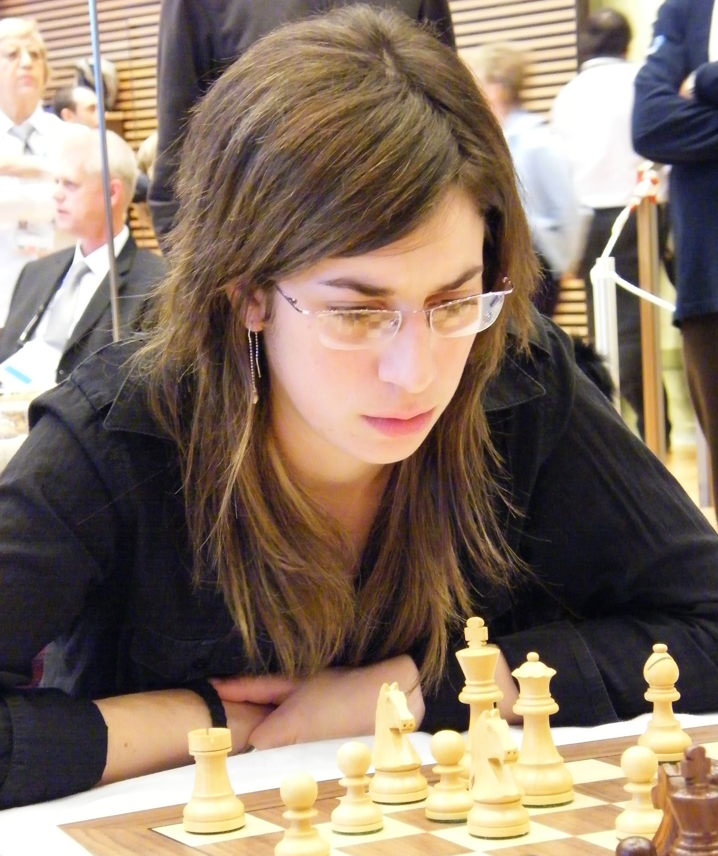 Carolina Lujan bei der 38. Schacholympiade in Dresden 2008